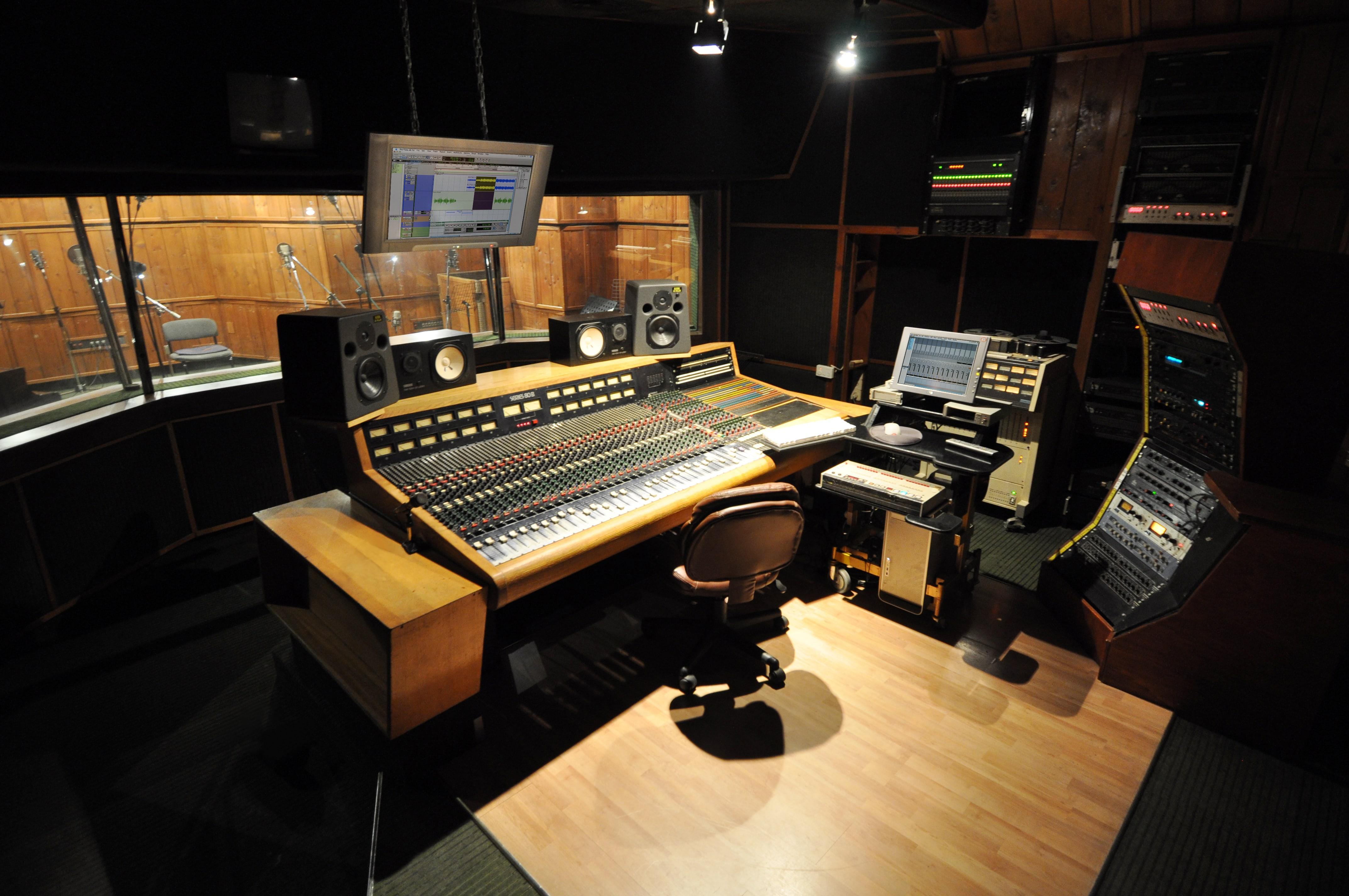 חדר הבקרה של האולפן הירוק